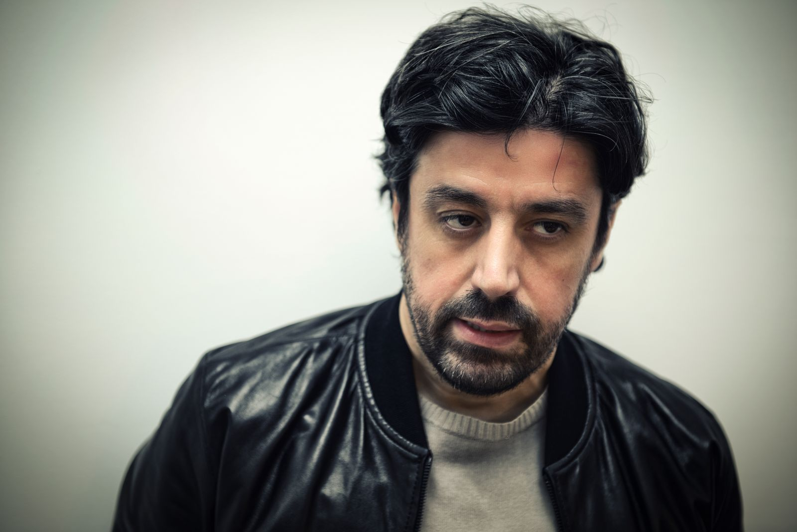 Federico Pace (foto di Matteo Sarlo)